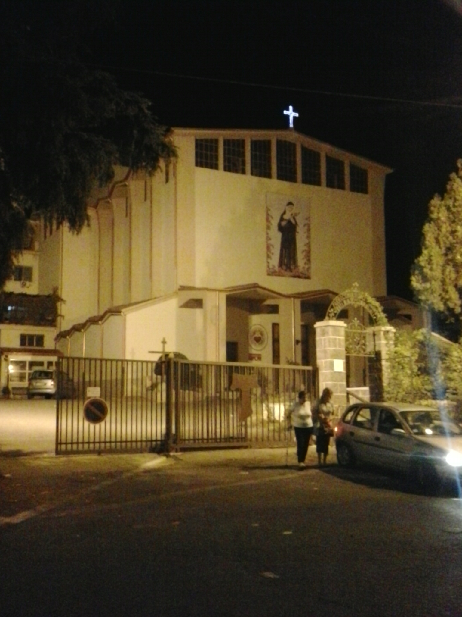 Parrocchia del Sacro Cuore (Catanzaro)